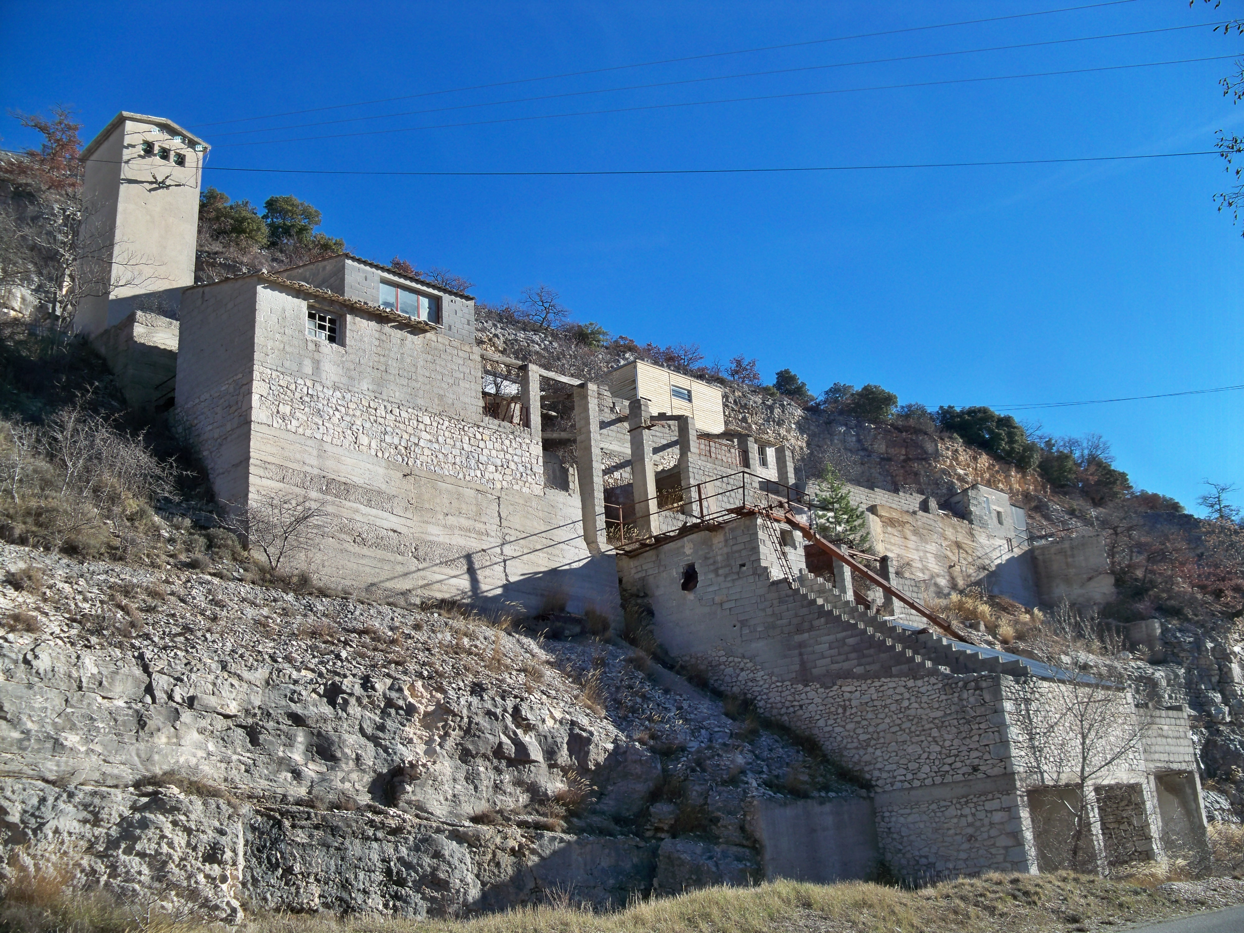 Batiment et carrière à Banon (04), France